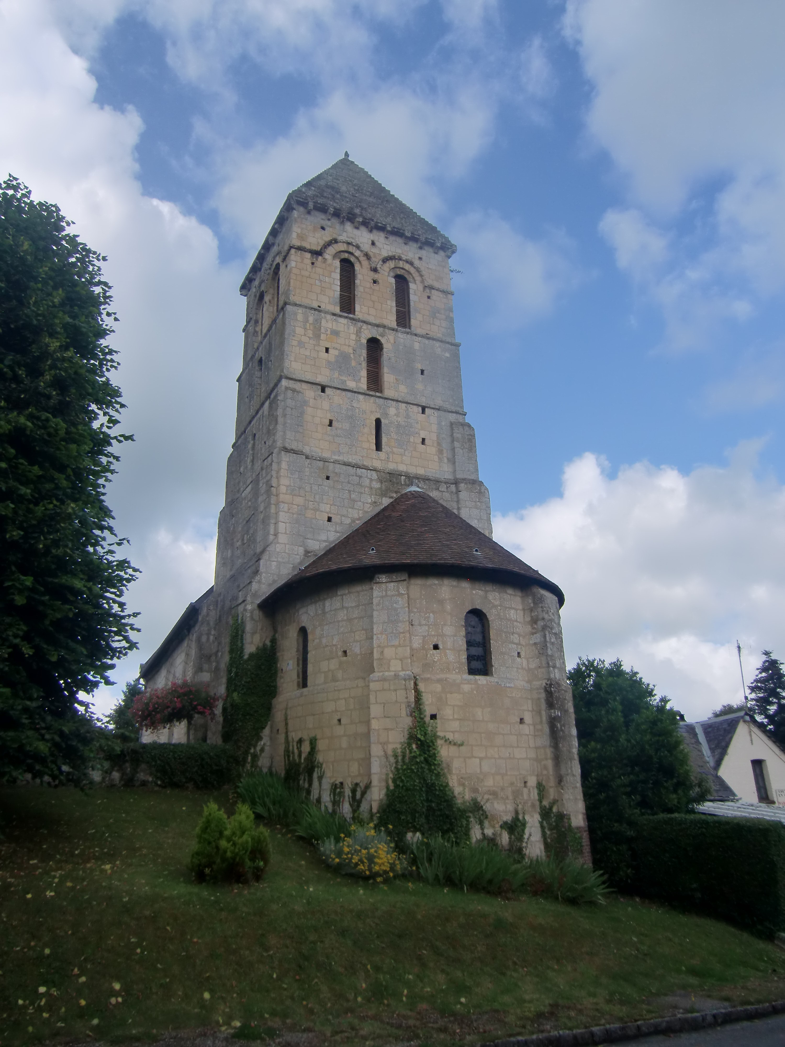 Eglise d'Aizier (Eure, Normandie, France)